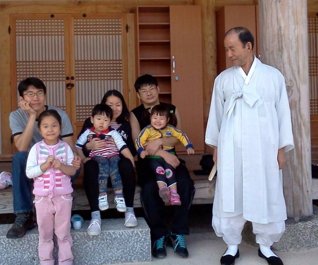 훈몽재 (우측 첫번째)에서 자녀, 손자, 손녀들과 함께